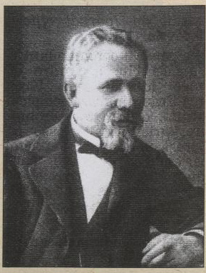 Photographie de l'architecte français Edouard LAmy.